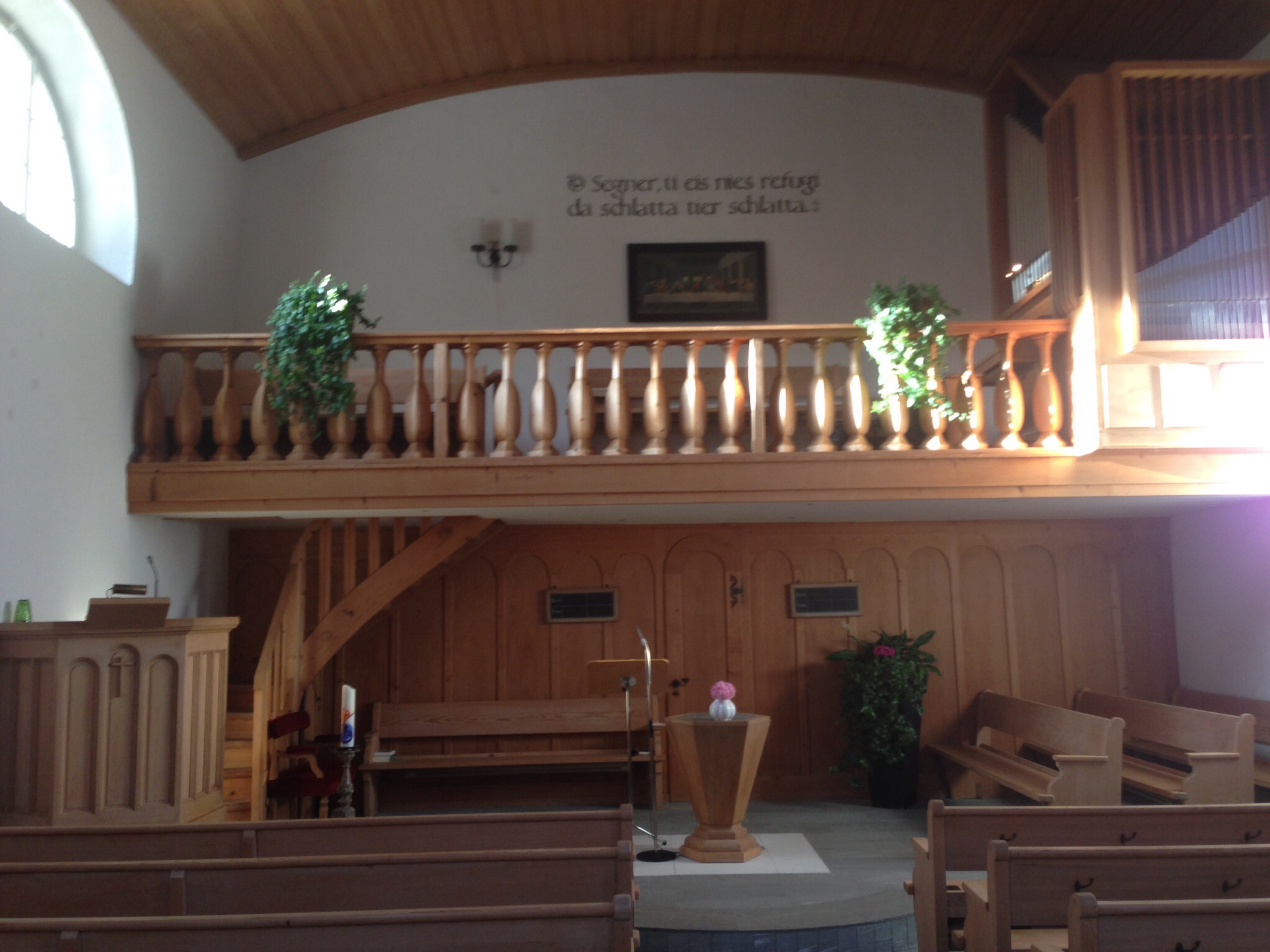 Innenraum der reformierten Kirche in Sagogn in der Surselva